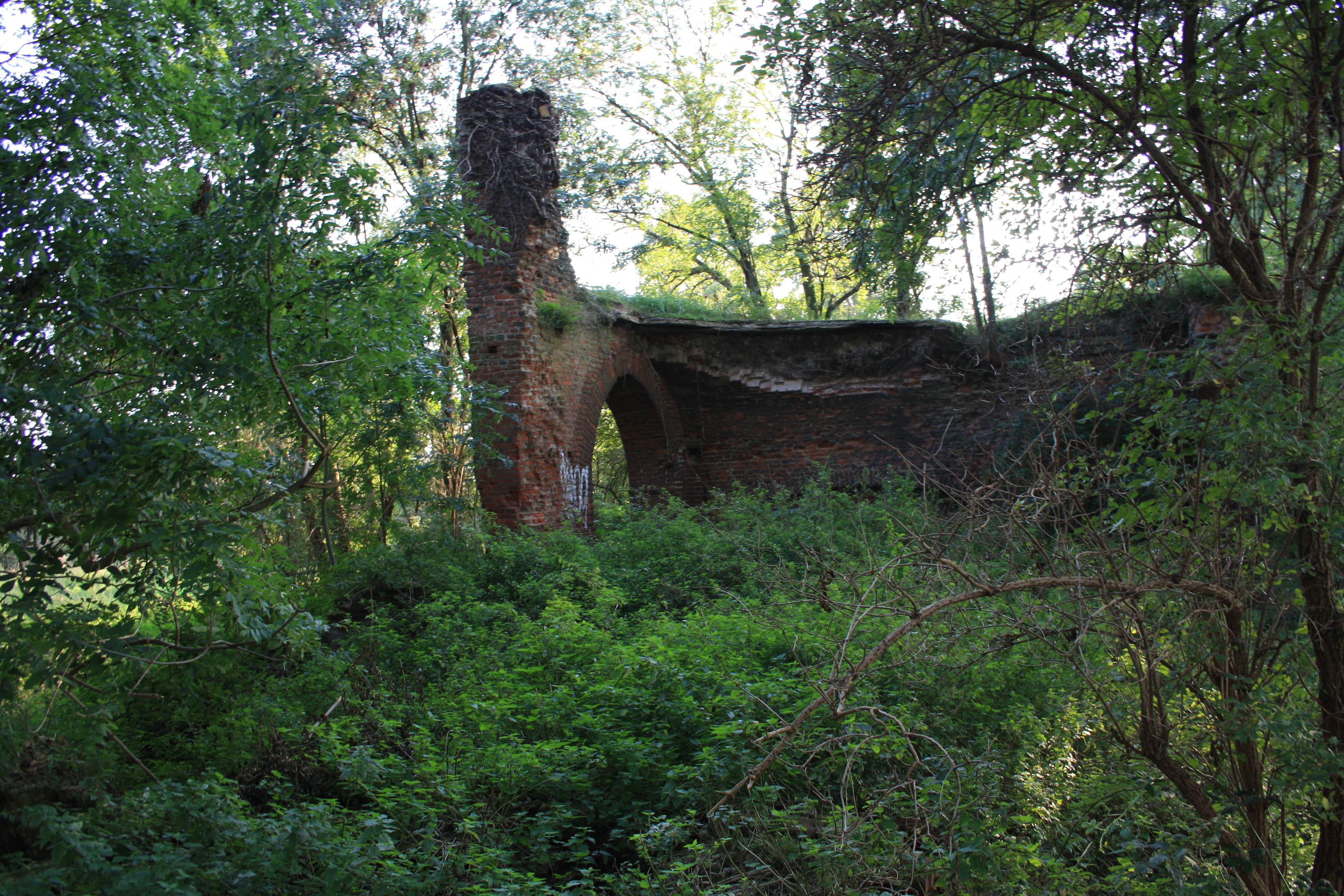 Ruine Haus Laach, Bergheim-ThorrThis is a photograph of an architectural monument.